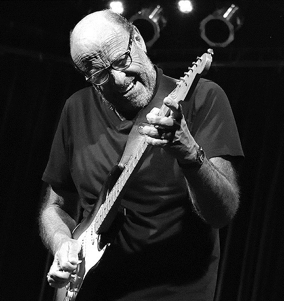 Héctor Starc en 2016.